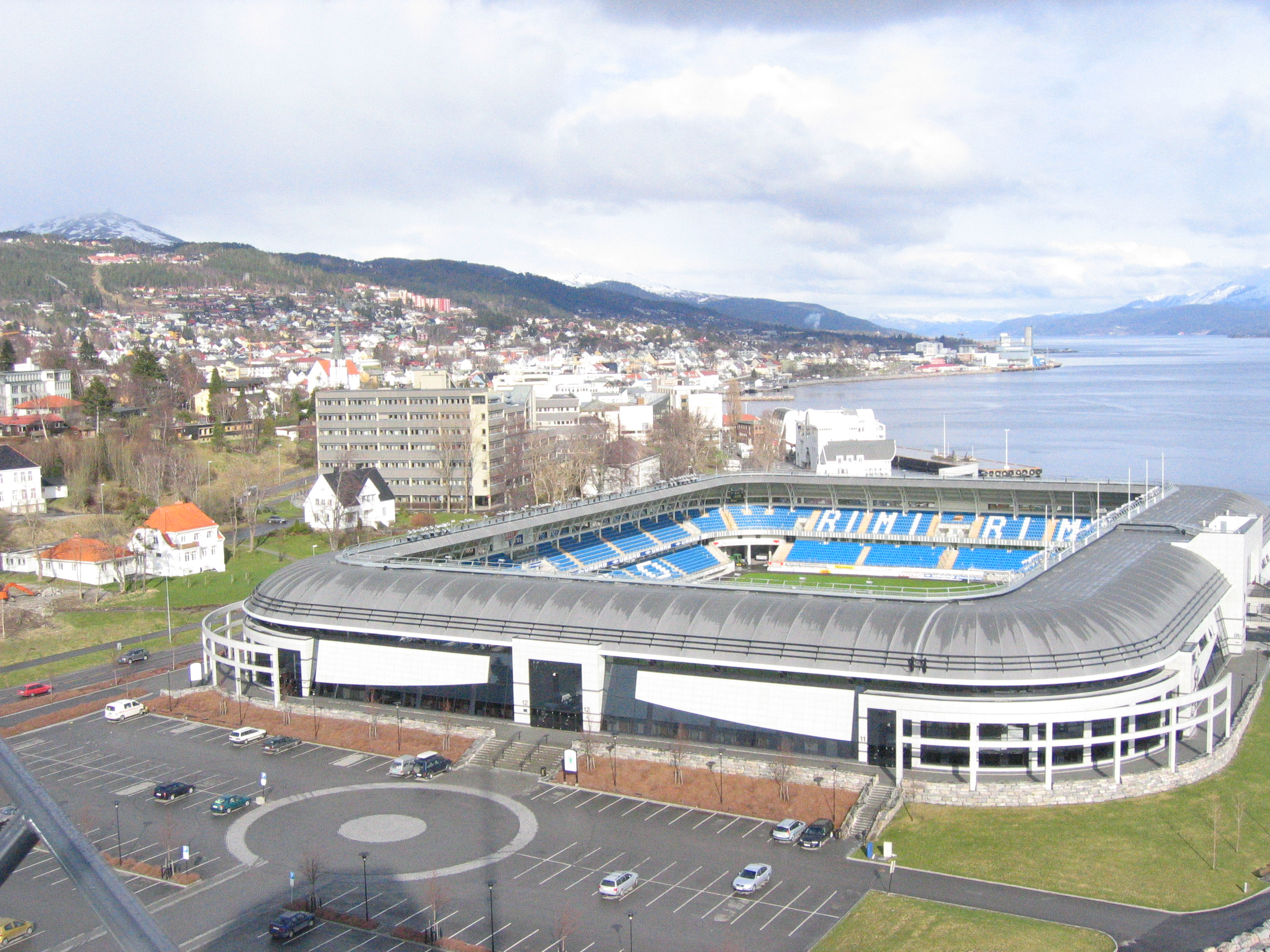 Aker stadion